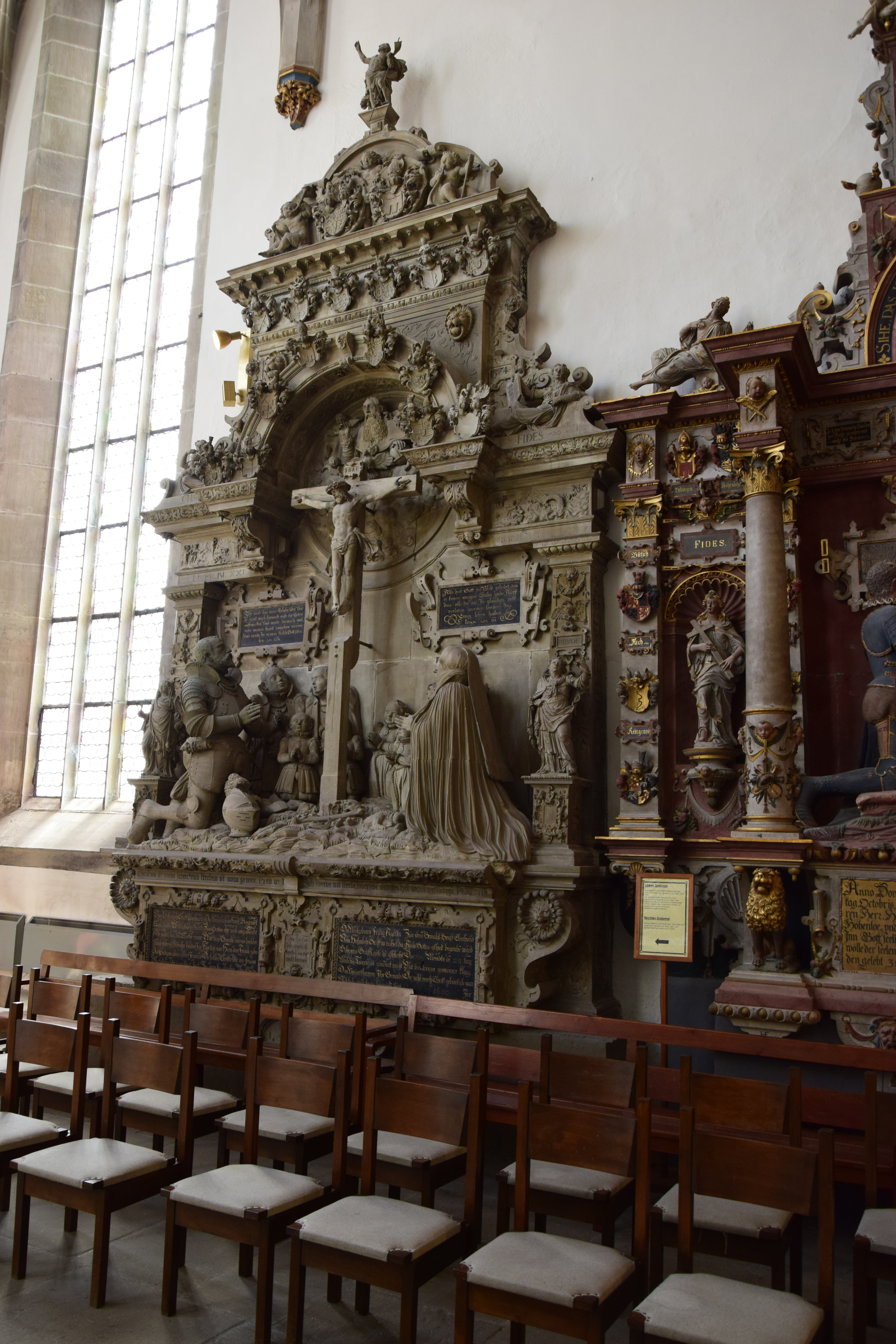 Epitaph Eberhard v. Hohenlohe und Agathe, Gräfin von Tübingen im Hochchor der Stiftskirche Öhringen im Hohenlohekreis, Deutschland.